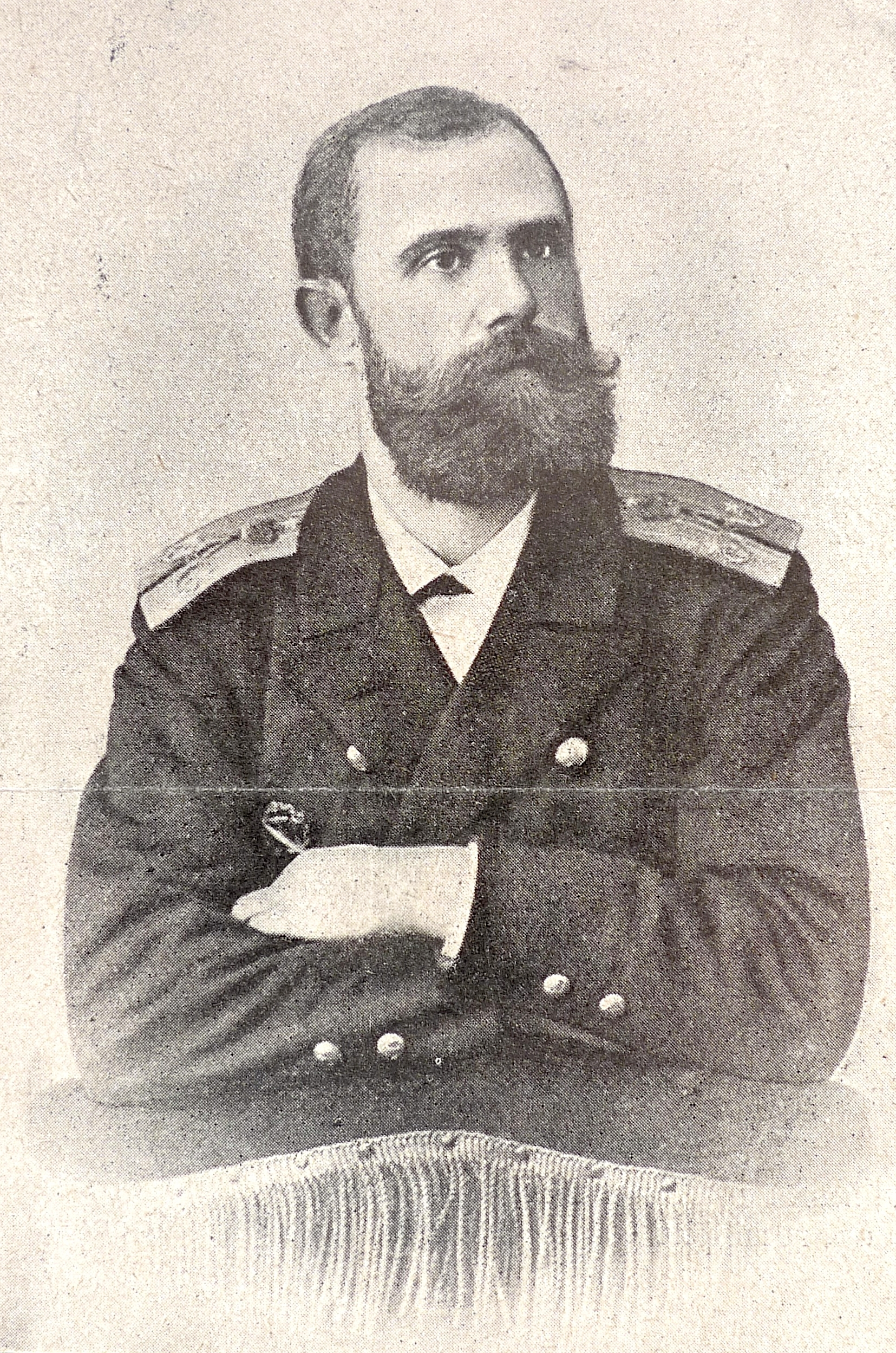 Сергеев, Александр Семёнович